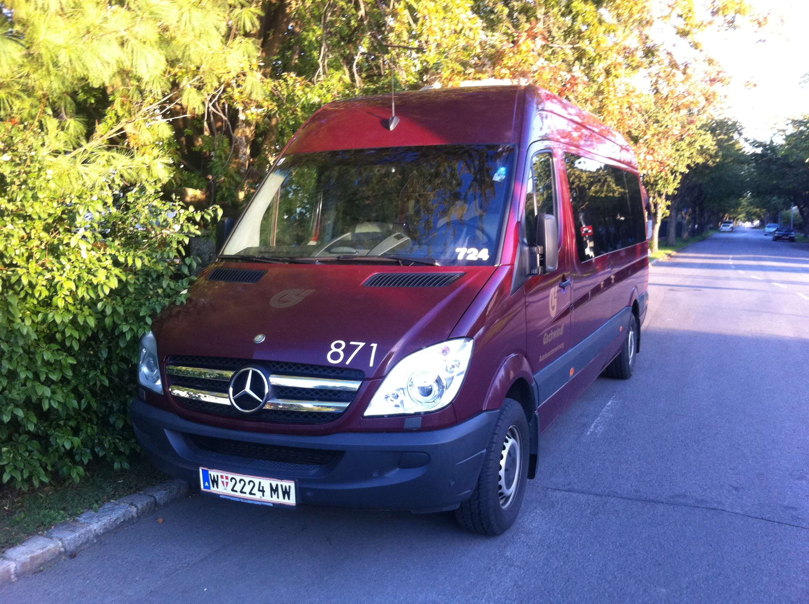 Ein Mercedes-Sprinter Kleinbus der Verkehrsbetriebe Gschwindl